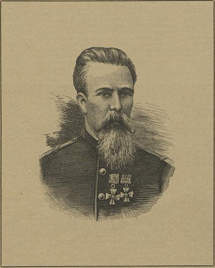 Marechal Carlos Machado Bittencourt, Ministro da Guerra do Brasil, assassinado em 5 de novembro de 1897.